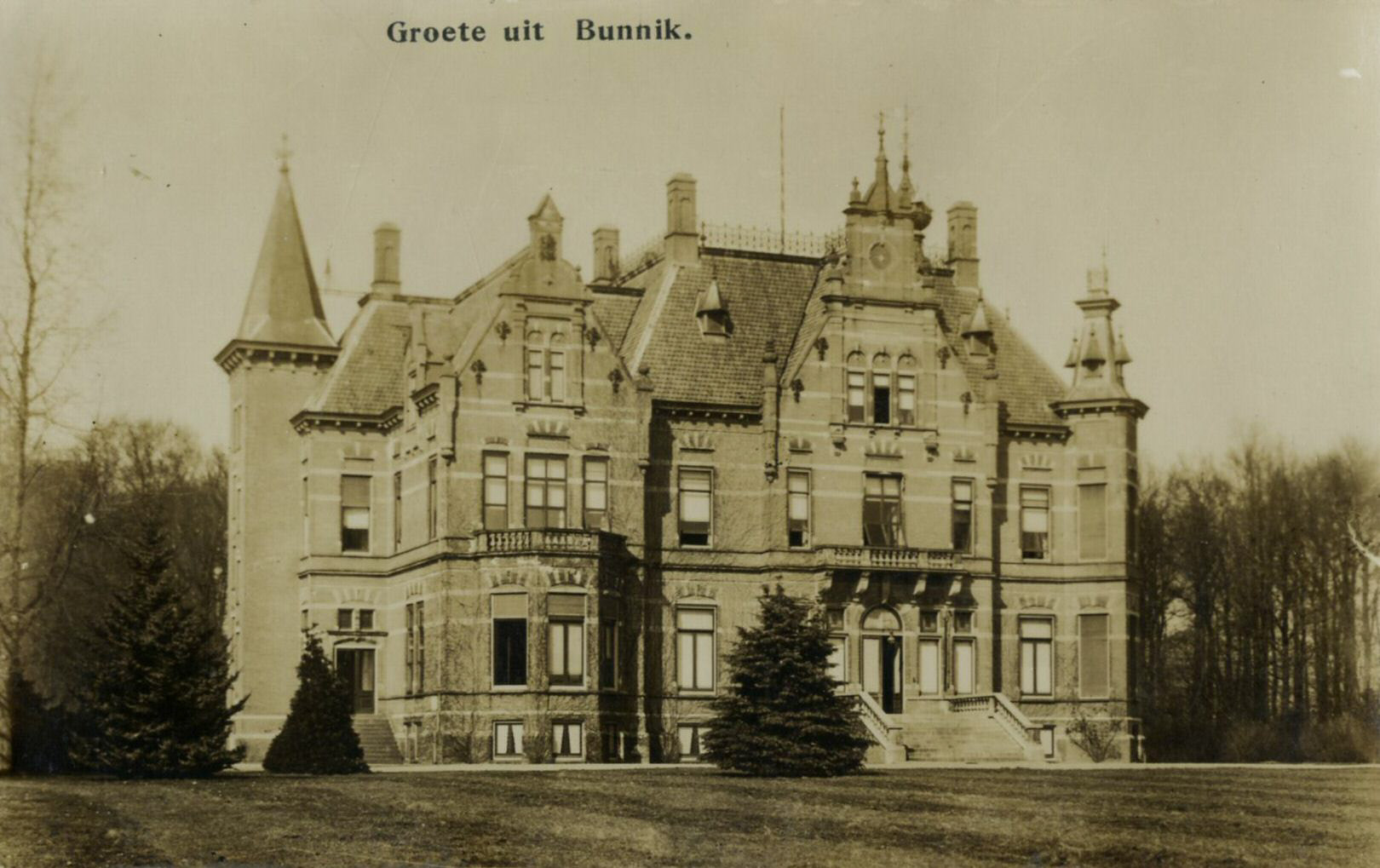 Voorgevel van het landhuis De Niënhof (Grotelaan 12) te Bunnik. Ontwerp Albert Nijland, gebouwd circa 1894, gesloopt ca. 1928.